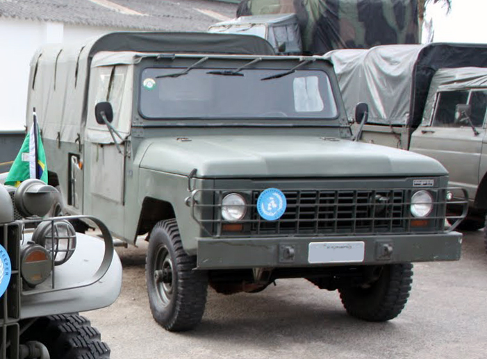 Engesa EE-34, ex-Brazilian Army